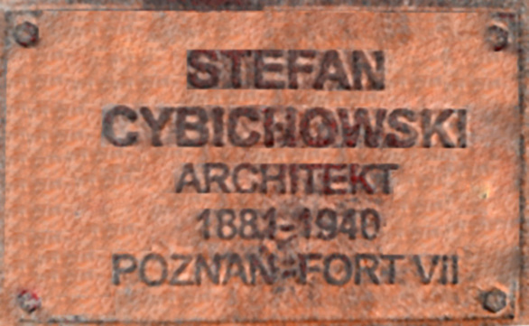 Tabliczka upamiętniająca Stefana Cybichowskiego, fragment Pomnika Polskiego Państwa Podziemnego i Armii Krajowej w Poznaniu